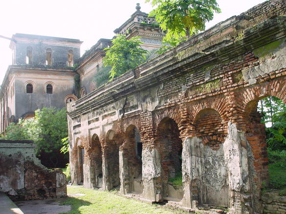 Ruins at Puthia, Rajshahi, Bangladesh.